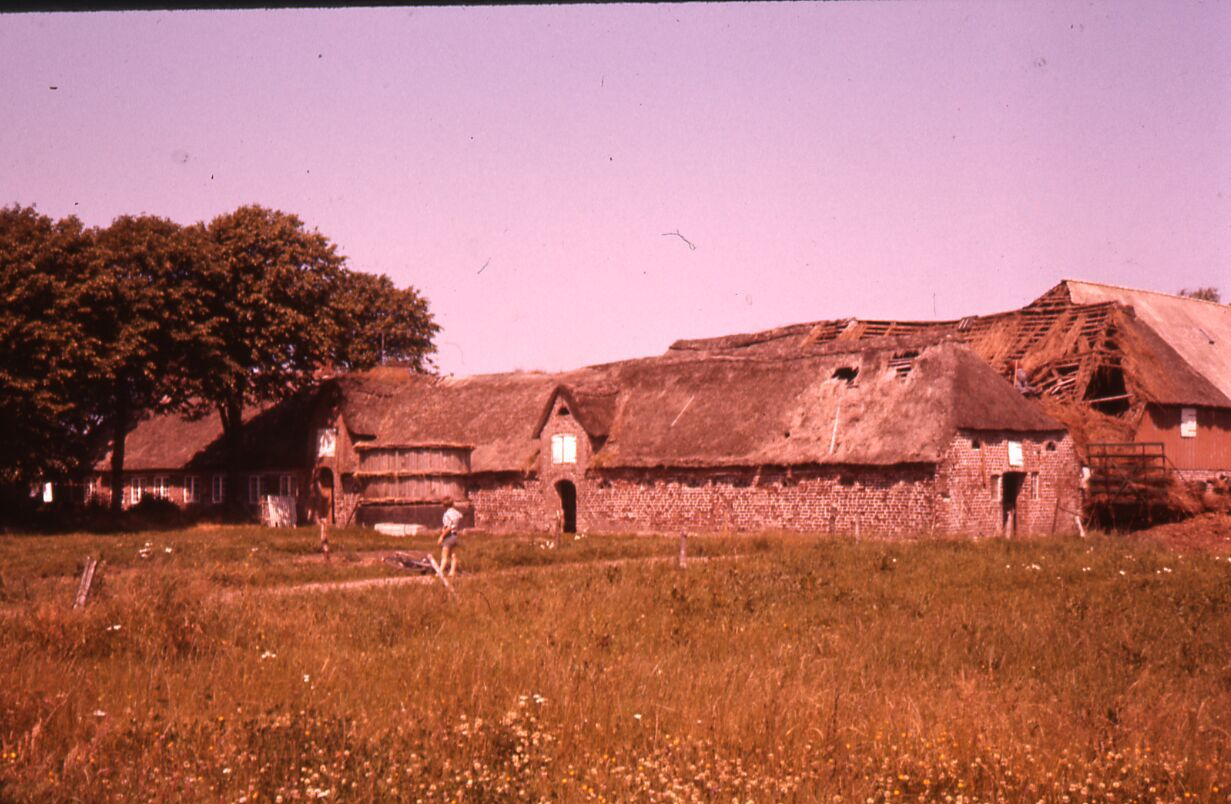 Gården fra Sønder Sejerslev på hjemstedet. Set fra sydvest (på museet sydøst!)